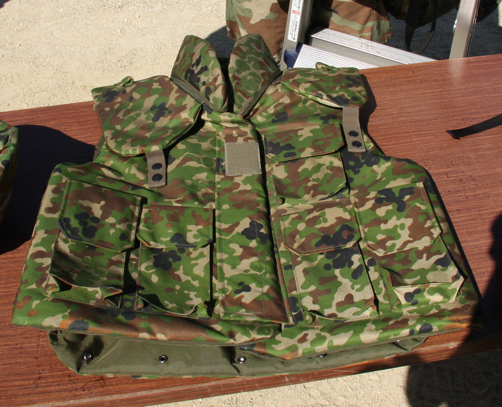 第10師団創立記念行事で展示される戦闘防弾チョッキ